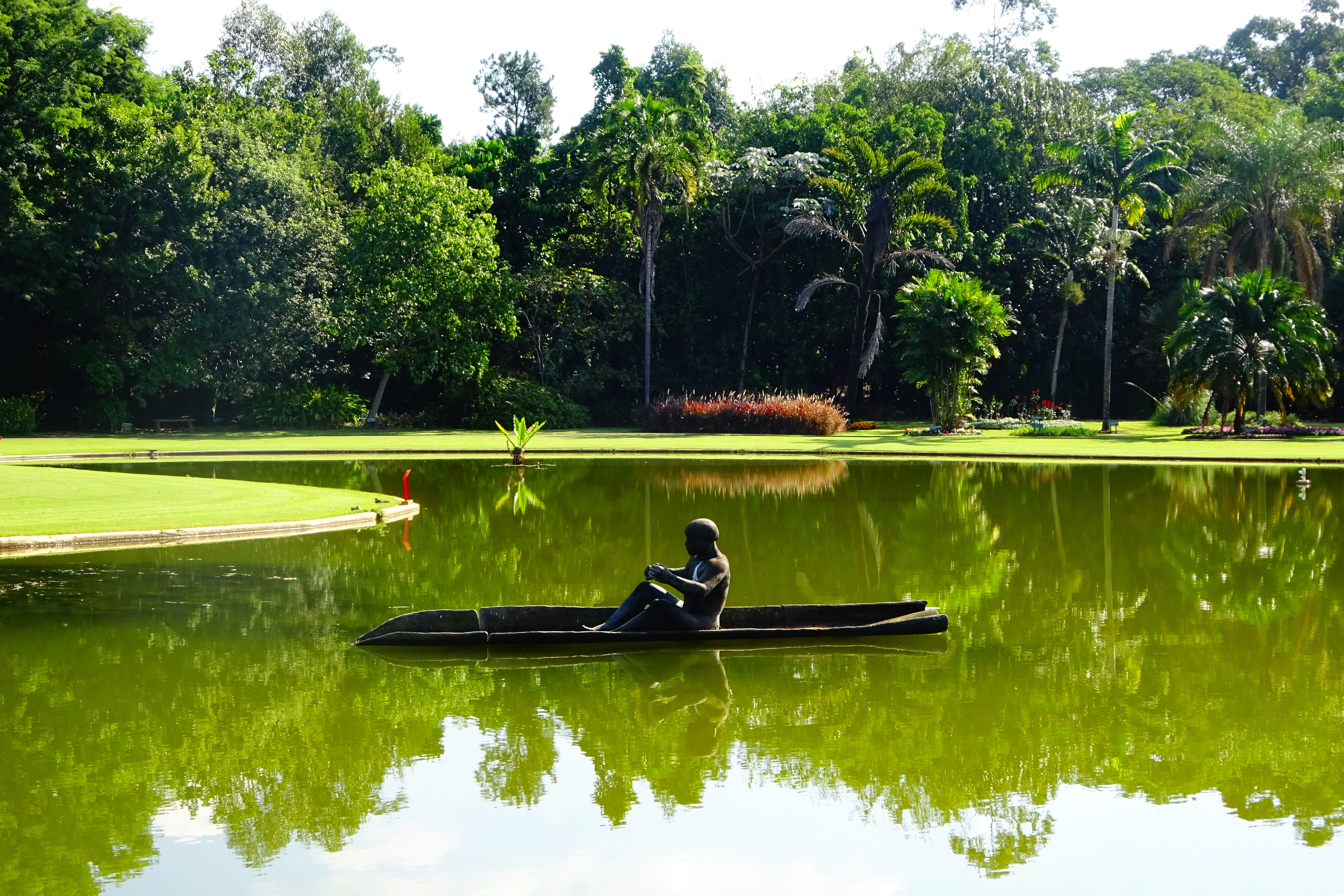 Escultura retratando um indígena.